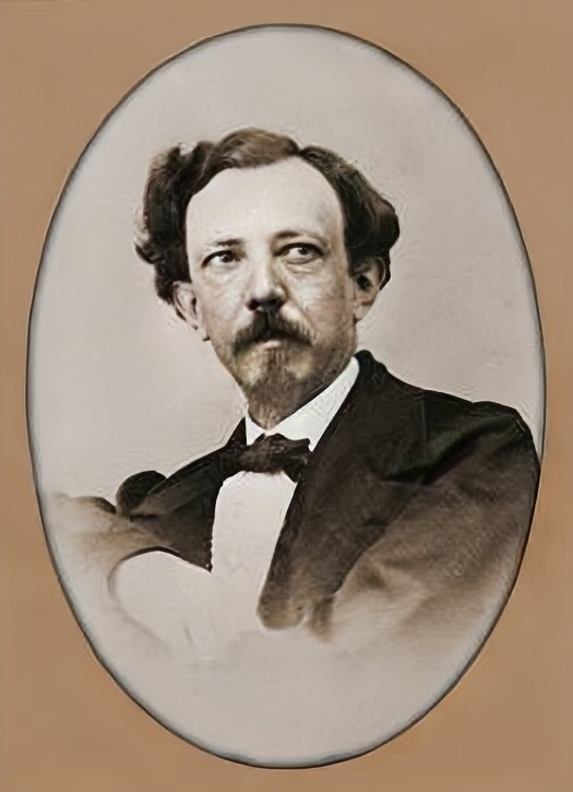 Emilio Teza (14 settembre 1831 – 30 marzo 1912), letterato, filologo e traduttore italiano, Autore sconosciuto, [1]